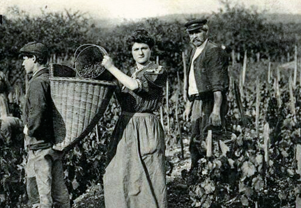 Vendages en france vers 1900